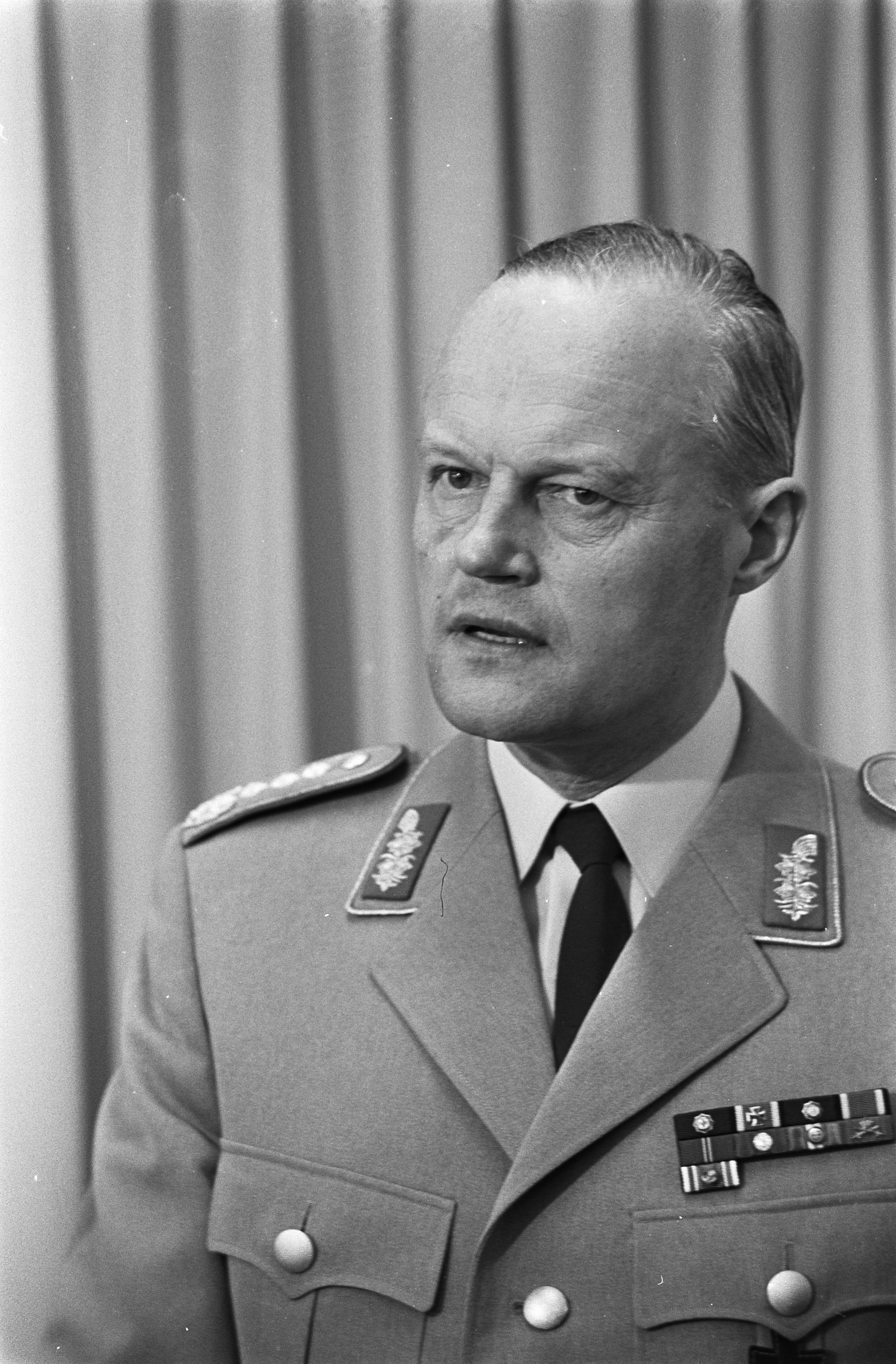 Der neue Oberbefehlshaber der alliierten Streitkräfte Europa-Mitte AFCENT Jürgen Bennecke bei einer Pressekonferenz.